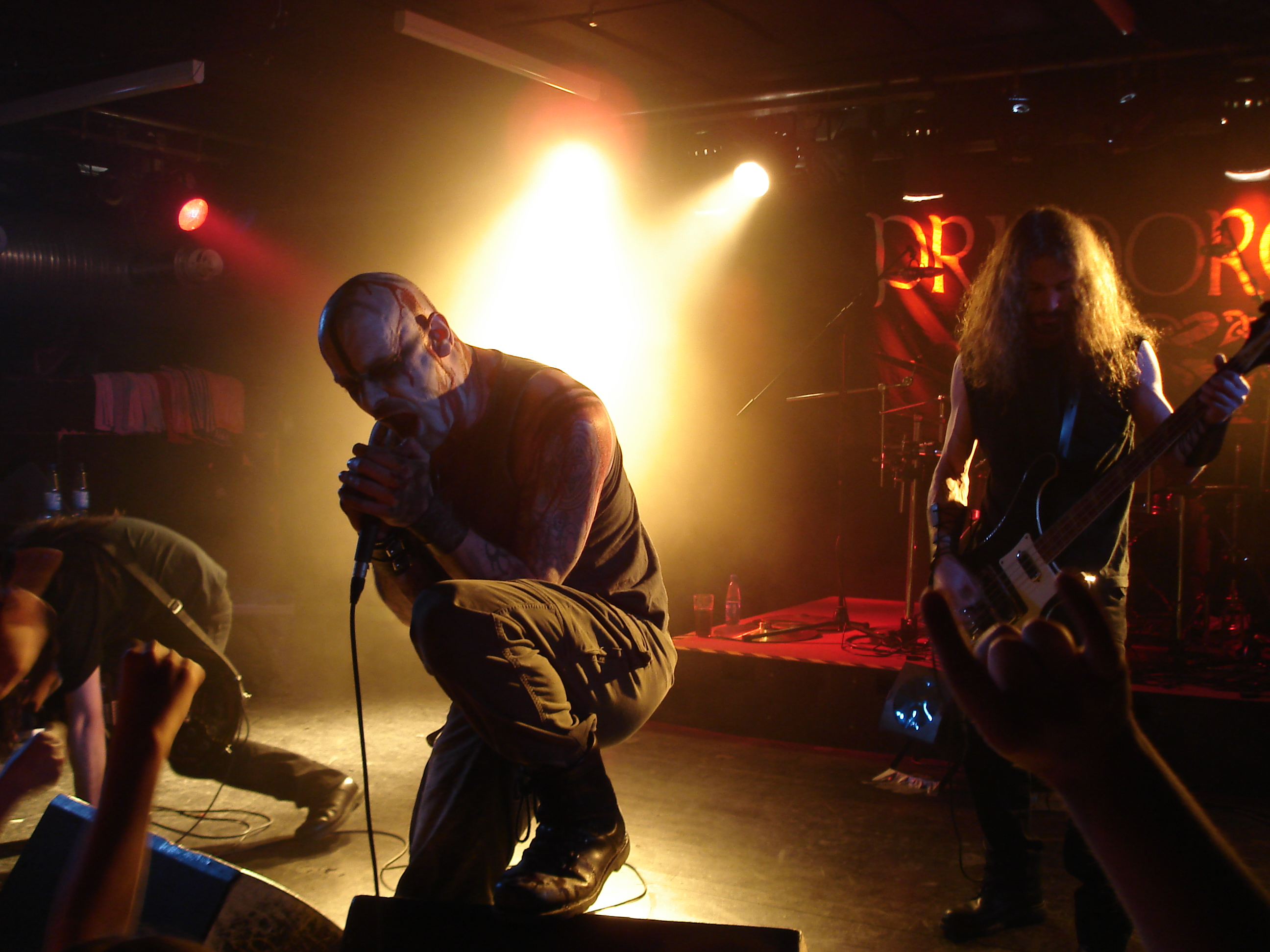 Irish band Primordial at Lutakko (Jyväskylä, Finland).